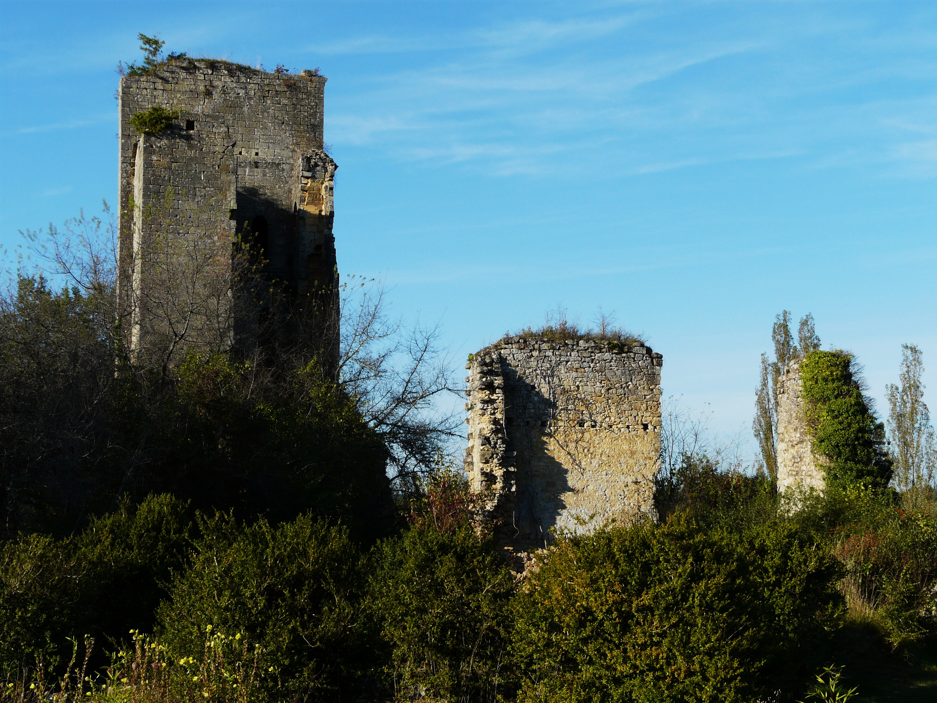 Les ruines du château de Miremont, Mauzens-et-Miremont, Dordogne, France.